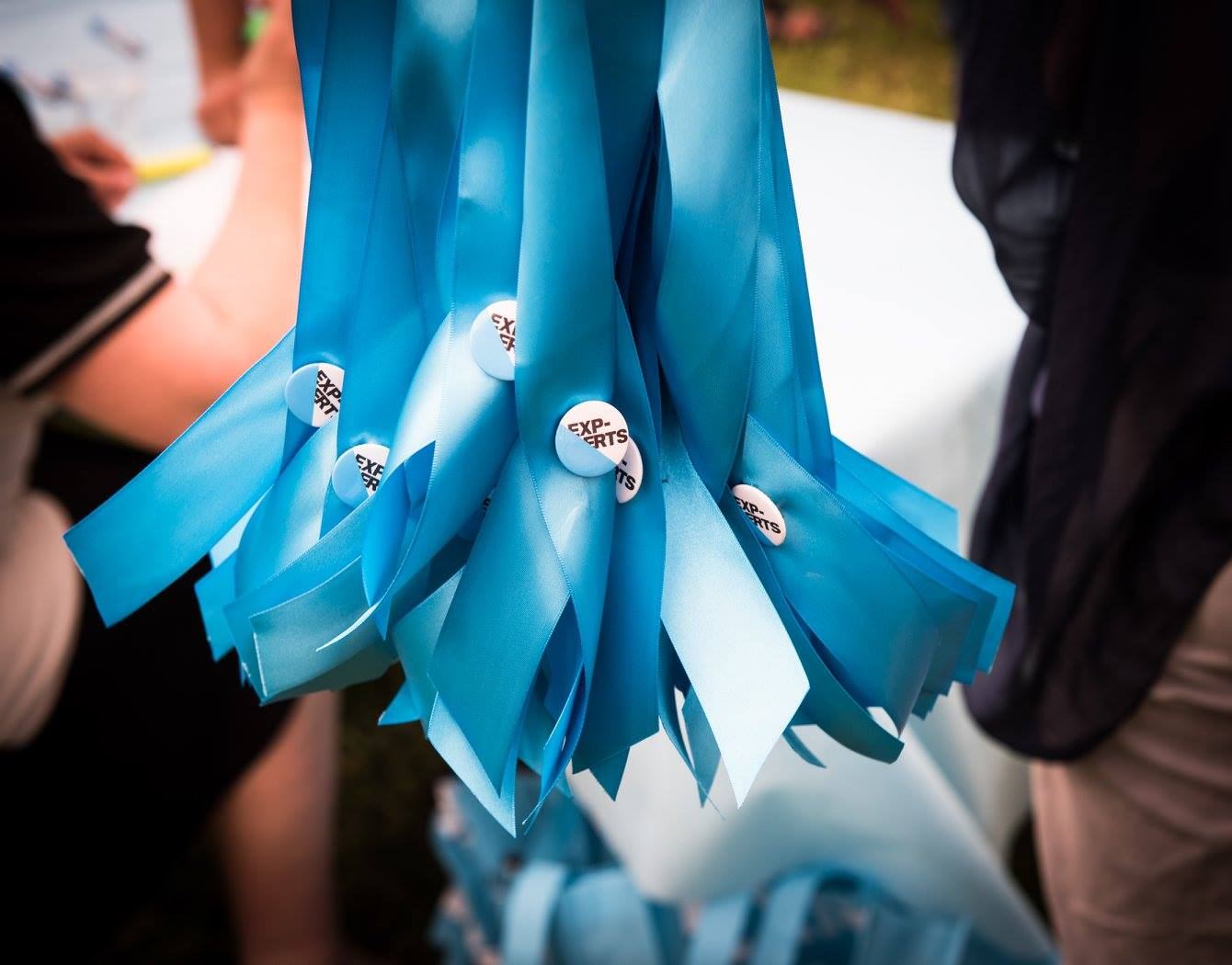 הנדסאים באריאל